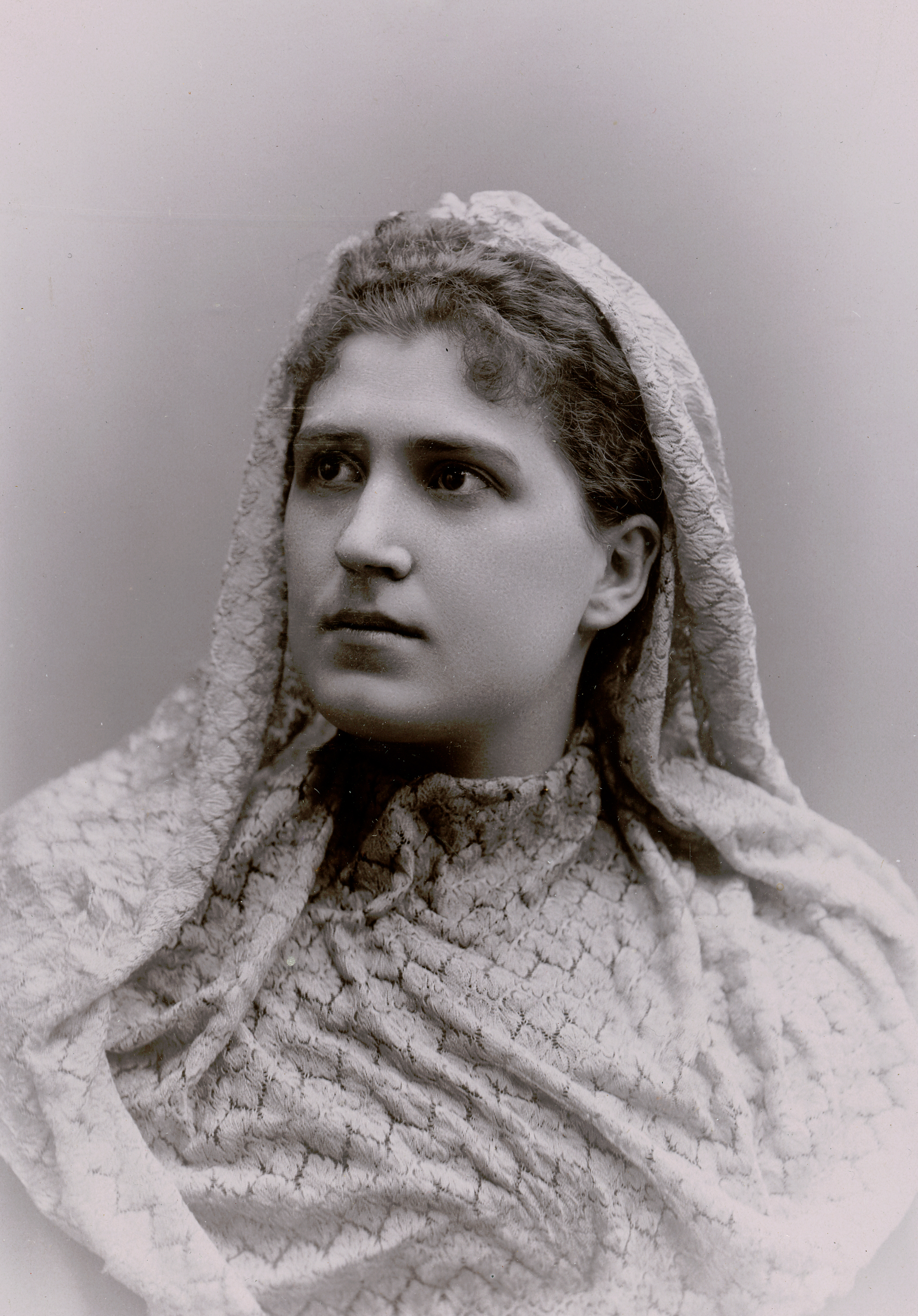 Ina Bock, elev vid Dramatiska teatern 1895